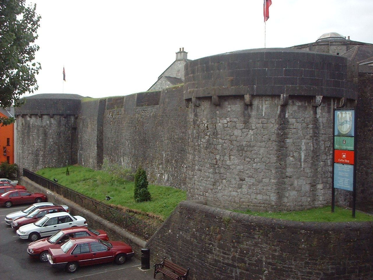 Castelo situado na cidade de Athlone, Irlanda.